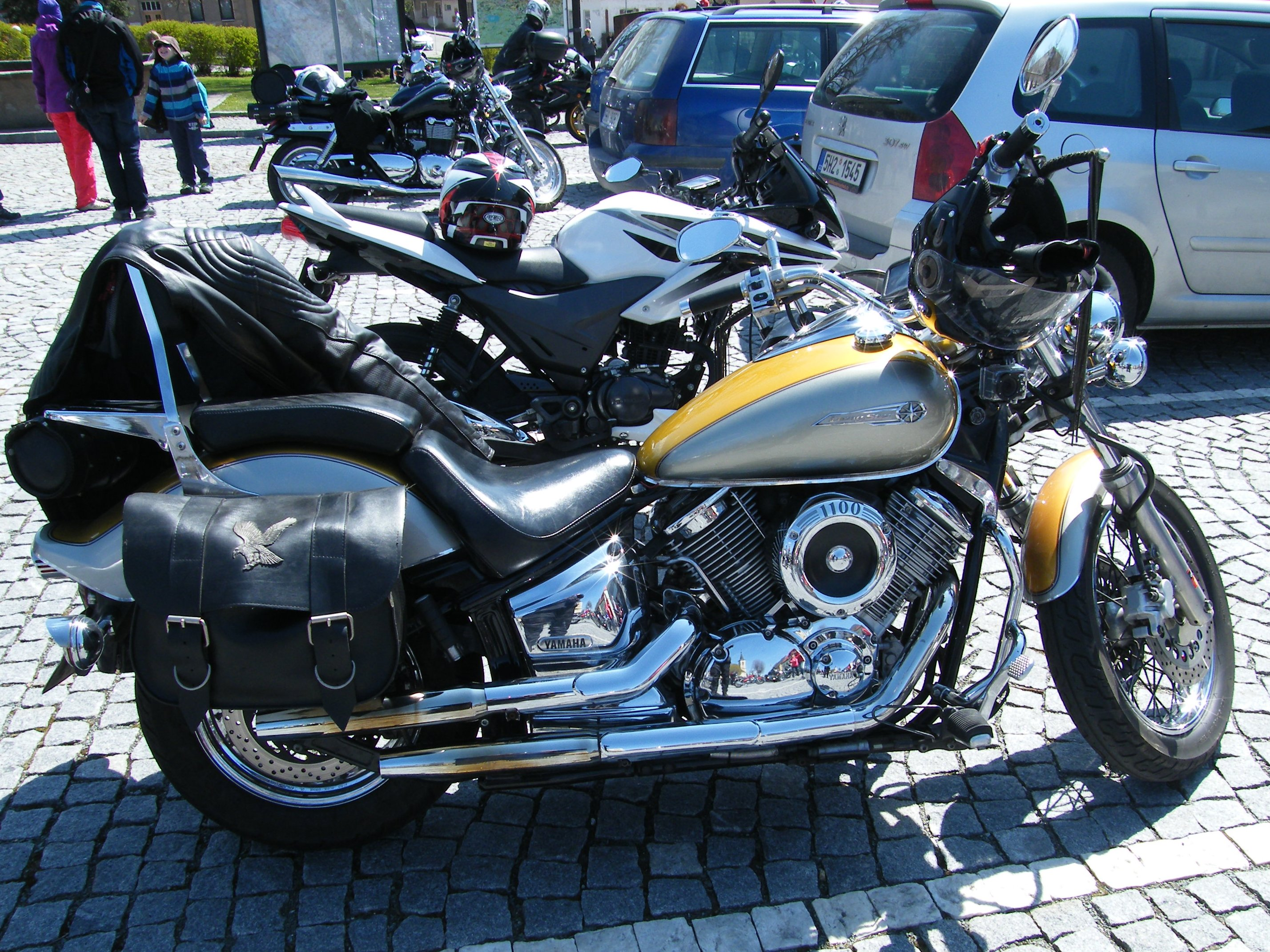 Yamaha XVS 1100 DragStar